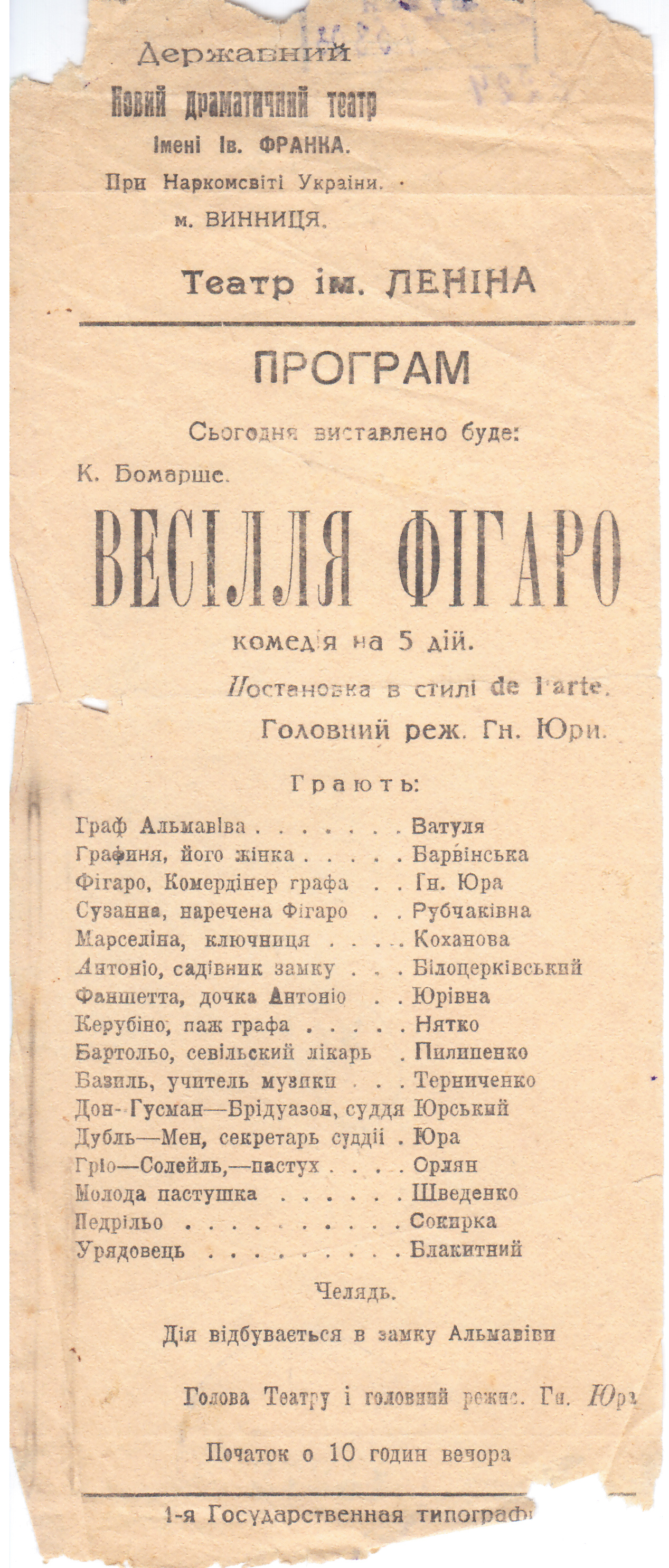 Програмка вистави "Весілля Фігаро"